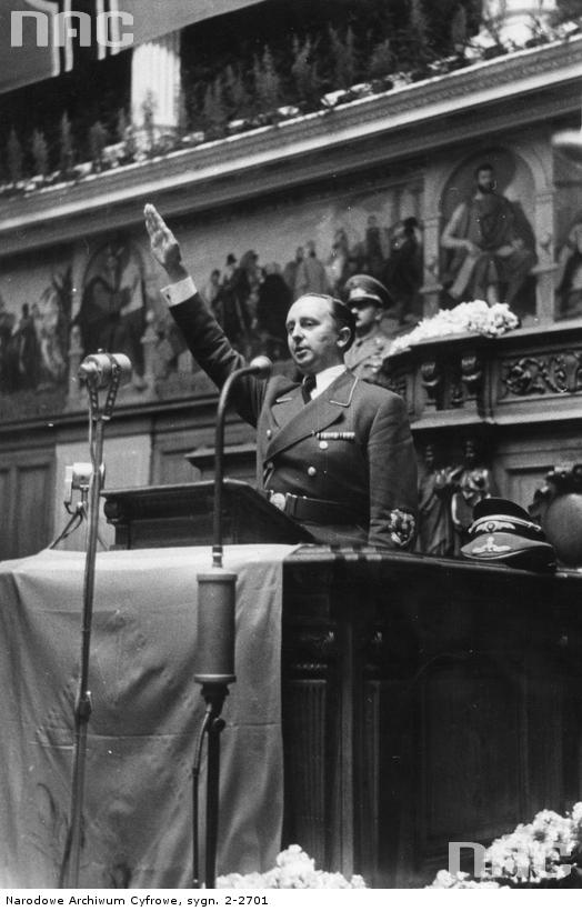 Губернатор дистрикта Галиция Карл фон Ляш на трибуне в 1941 г. (Львов)